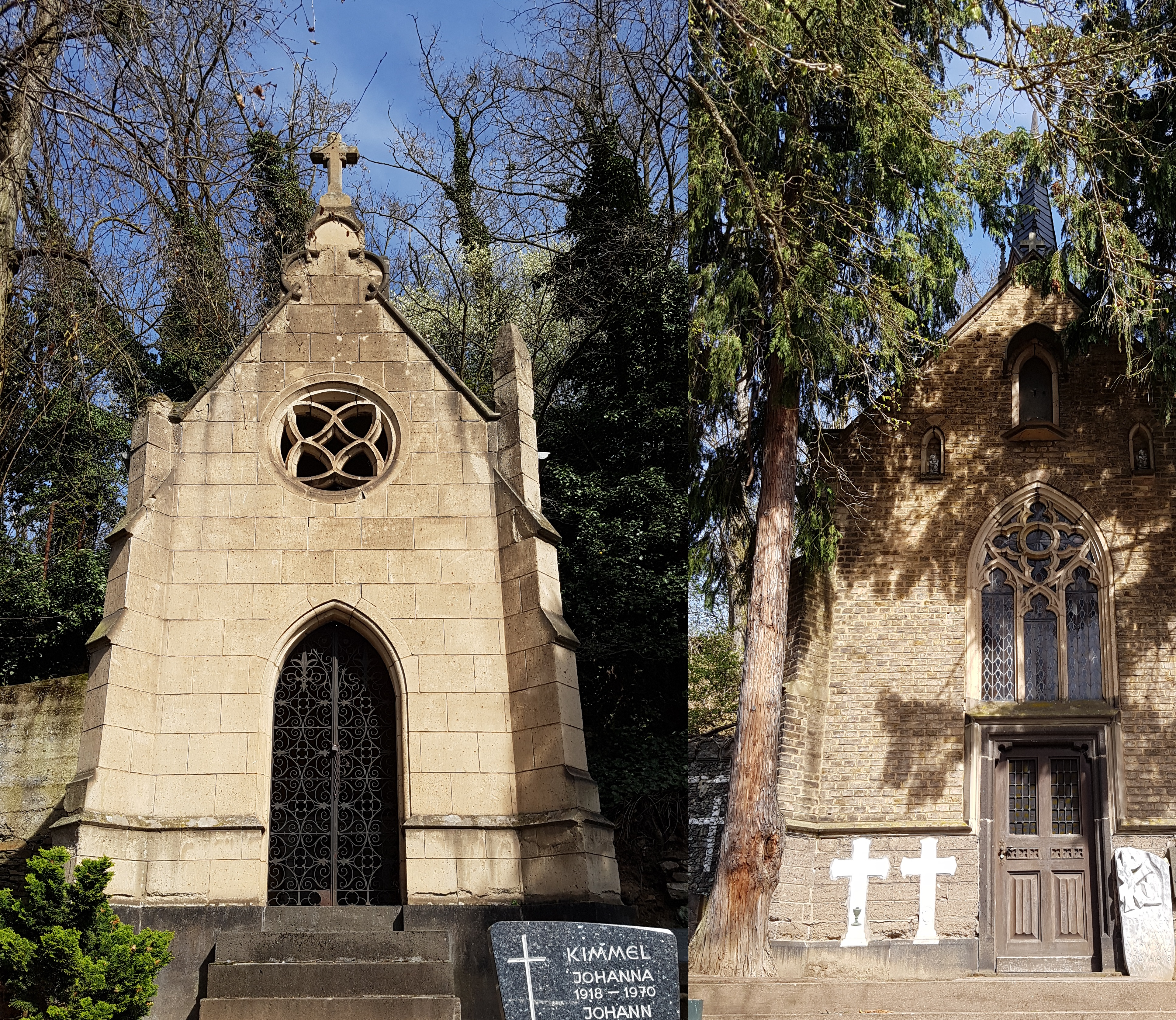 Denkmal